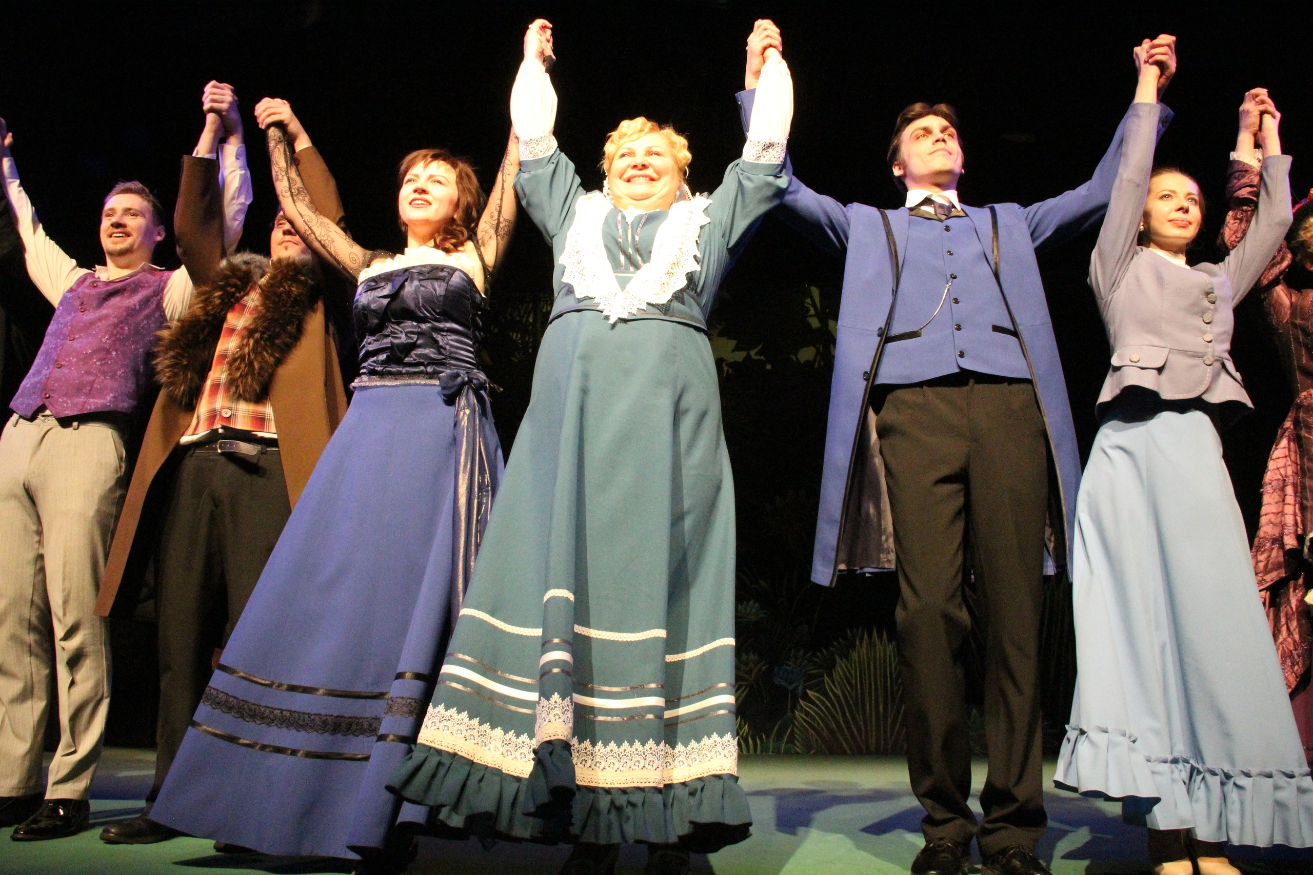 фото